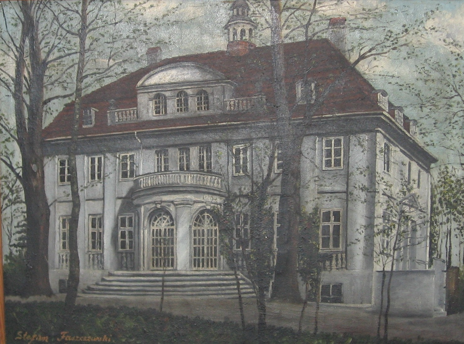 Zakrzewo powiat wolsztynski gmina Siedlec ca 1920